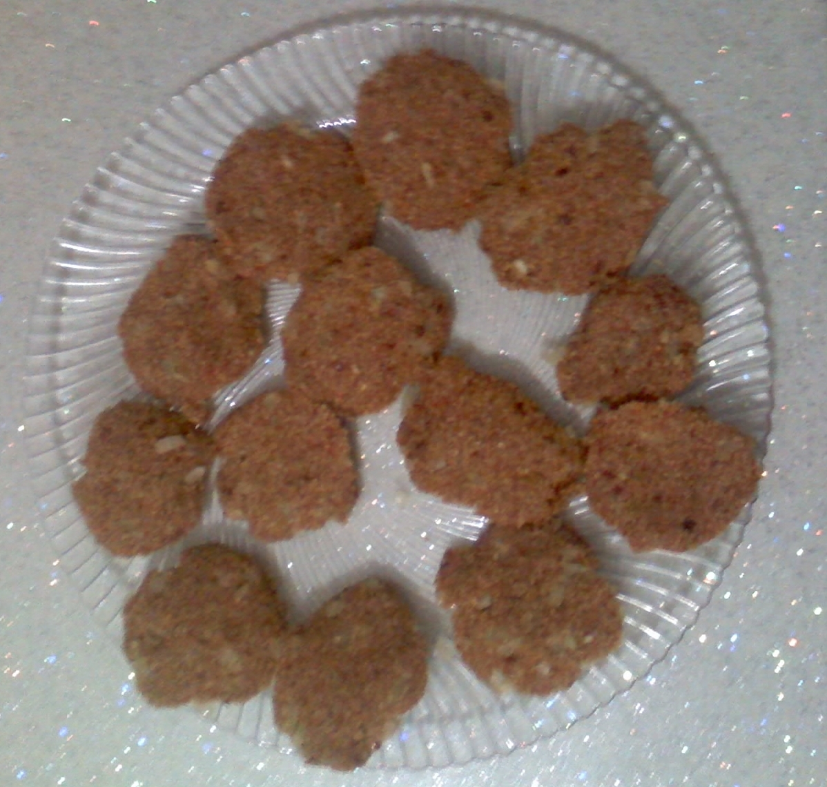 Bir köfte çeşidi, Besmeç.